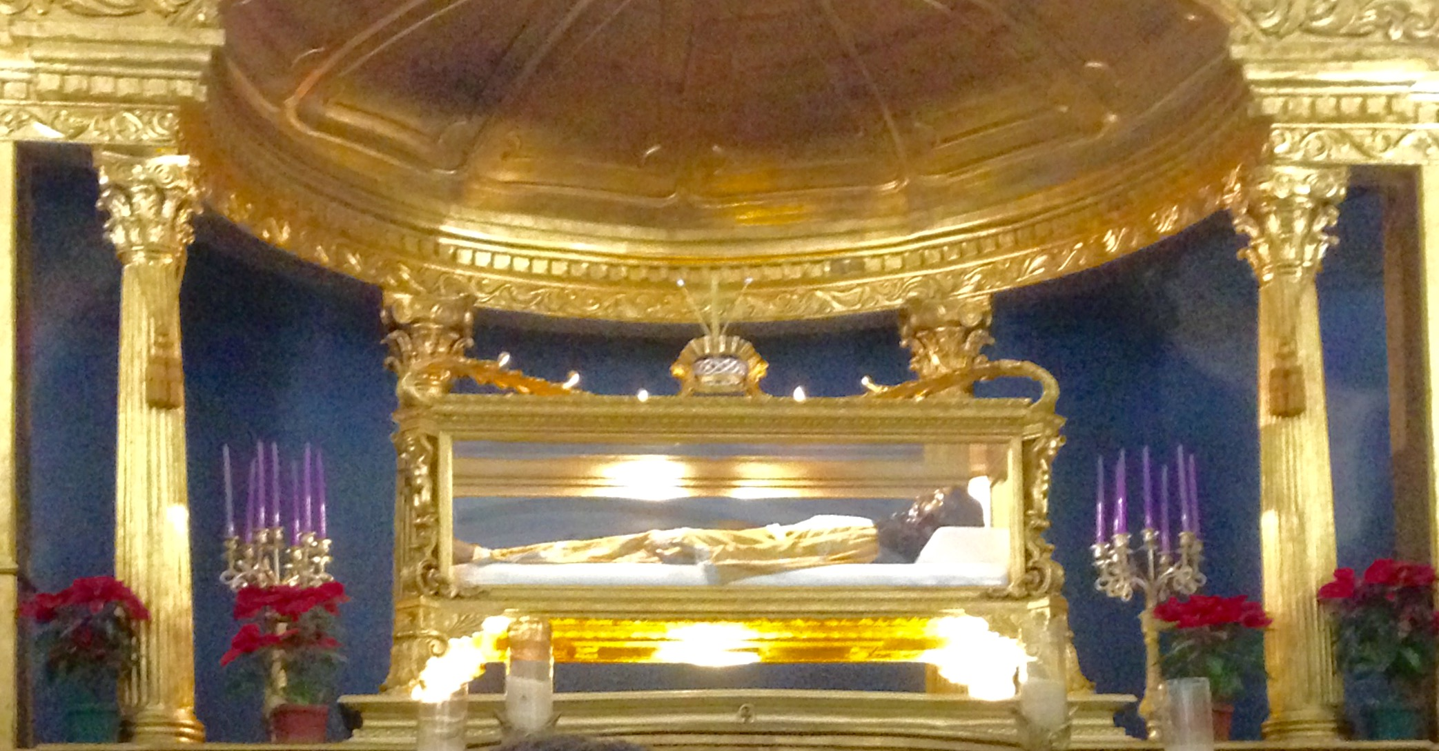 Imagen del Señor Sepultado de Santo Domingo, Cristo del Amor en Ciudad de Guatemala. Diciembre de 2015.